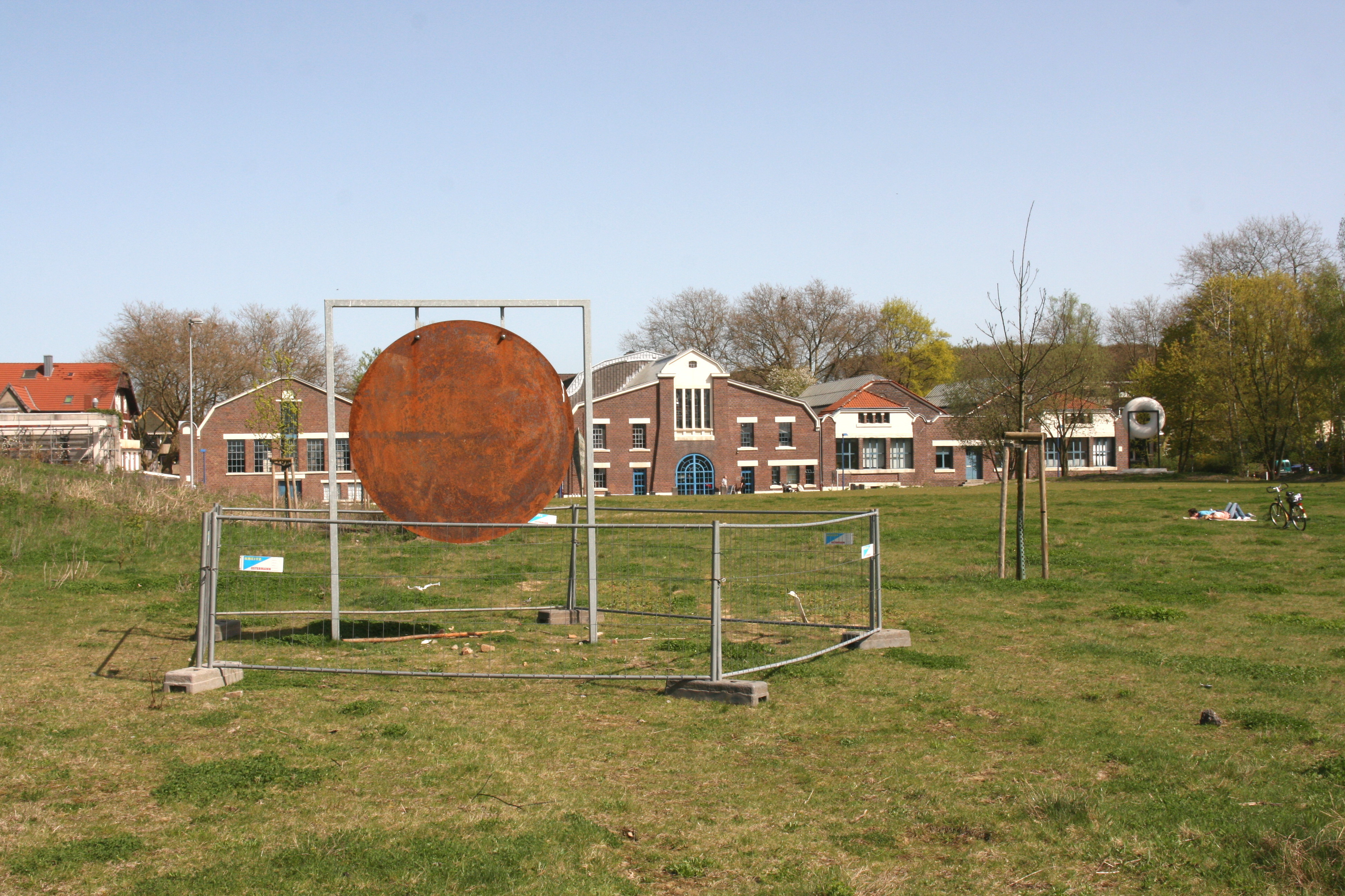 Gong für Flottmann von Sandro Antal im Skulpturenpark Flottmann in Herne